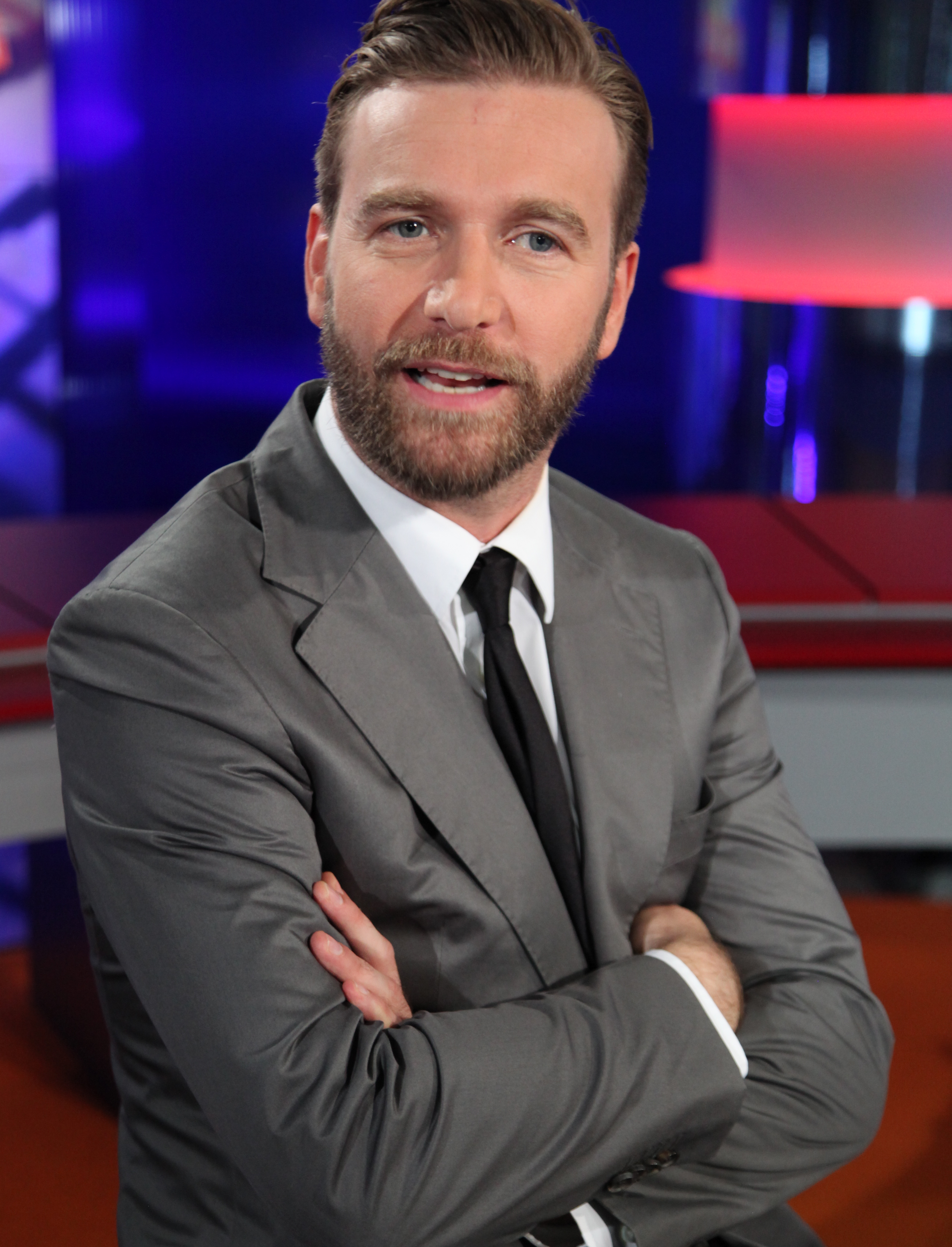 Niels Ruf am 28.02.2011 in Berlin-Mitte.